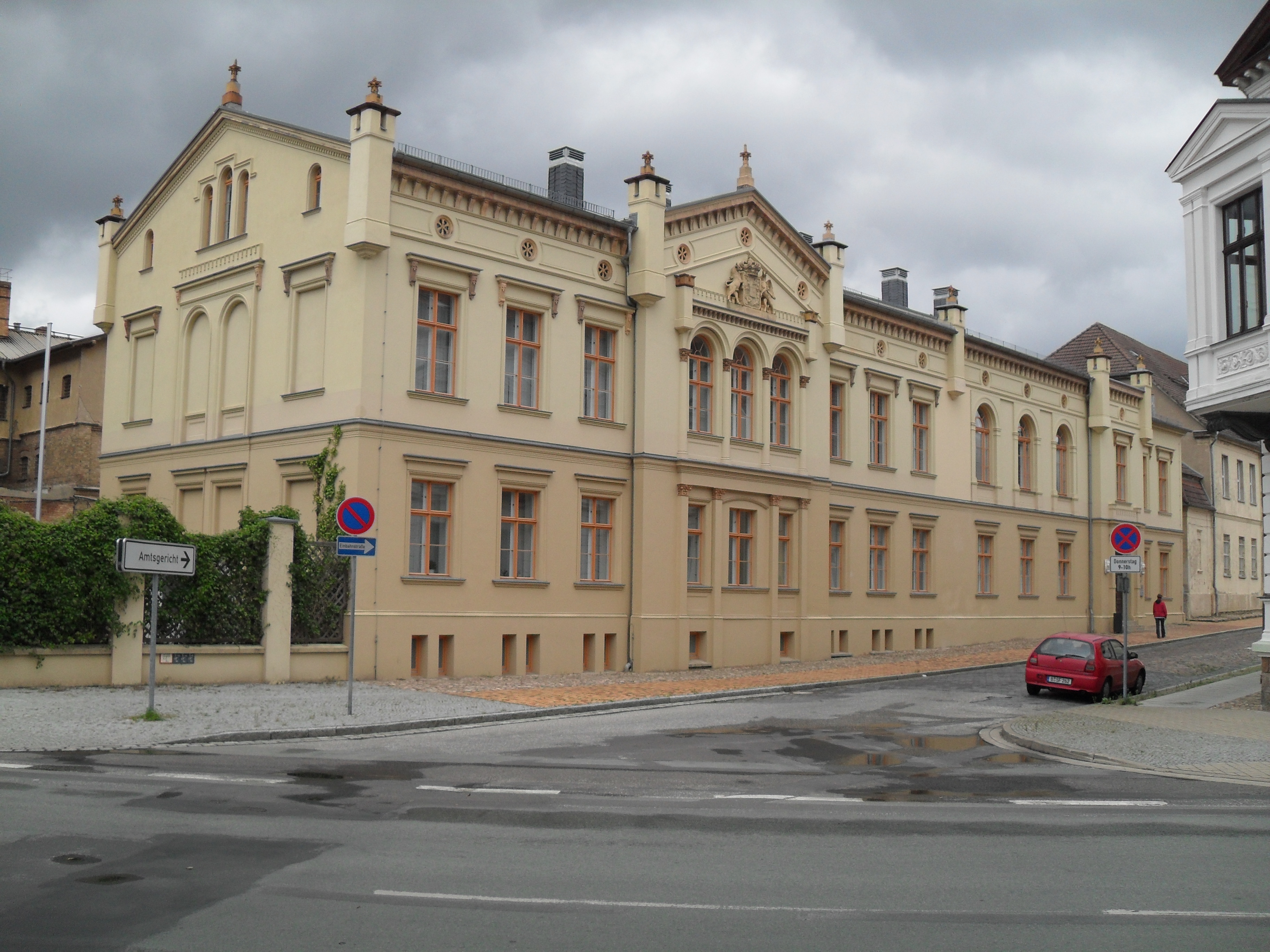 ehem. Landgericht an der Töpferstraße in Neustrelitz